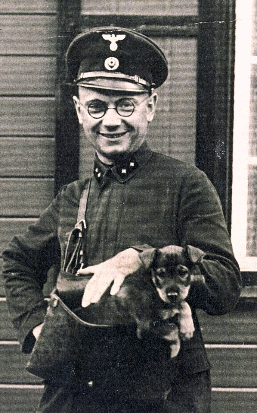 Falter Fürstenau als Briefzusteller mit seinem Dackel "Waldi"